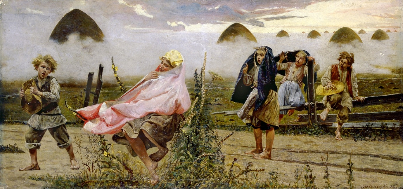 Boginka w dziewannach (cykl Rusałki). Olej na płótnie. 45,5 x 96,5 cm. Muzeum Uniwersytetu Jagiellońskiego w Krakowie.